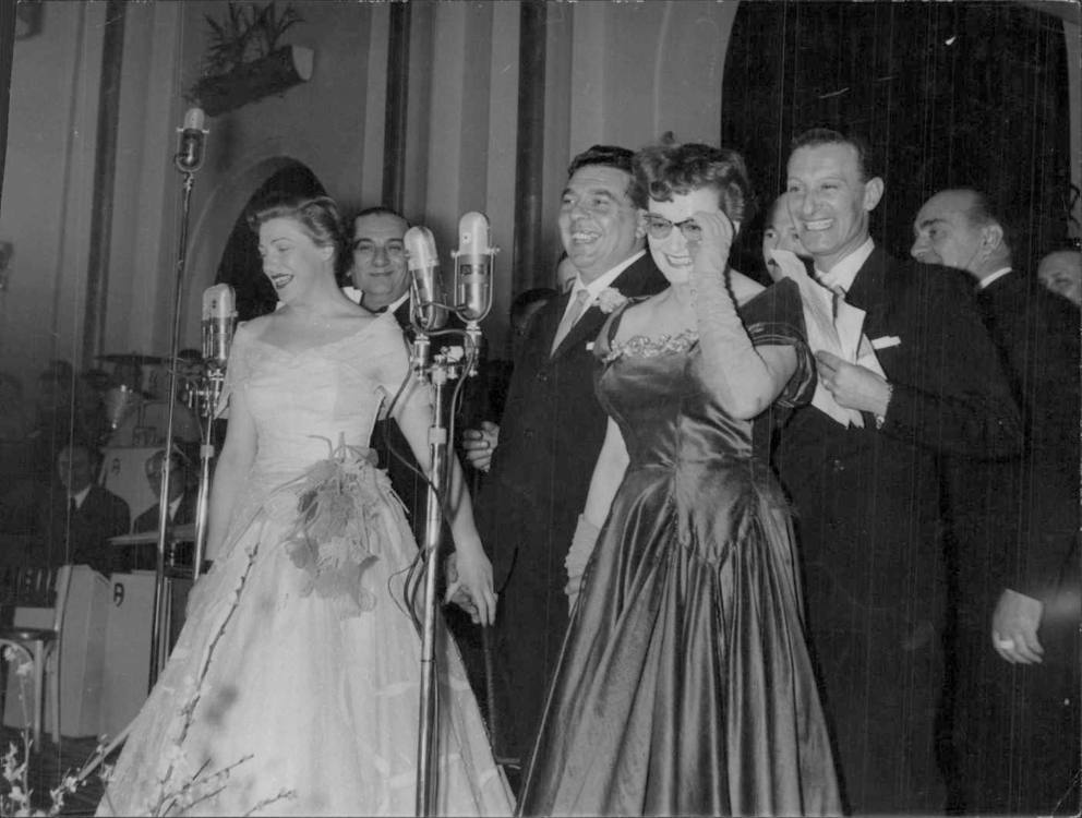 Le vincitrici dell'edizione del Festival di Sanremo 1953